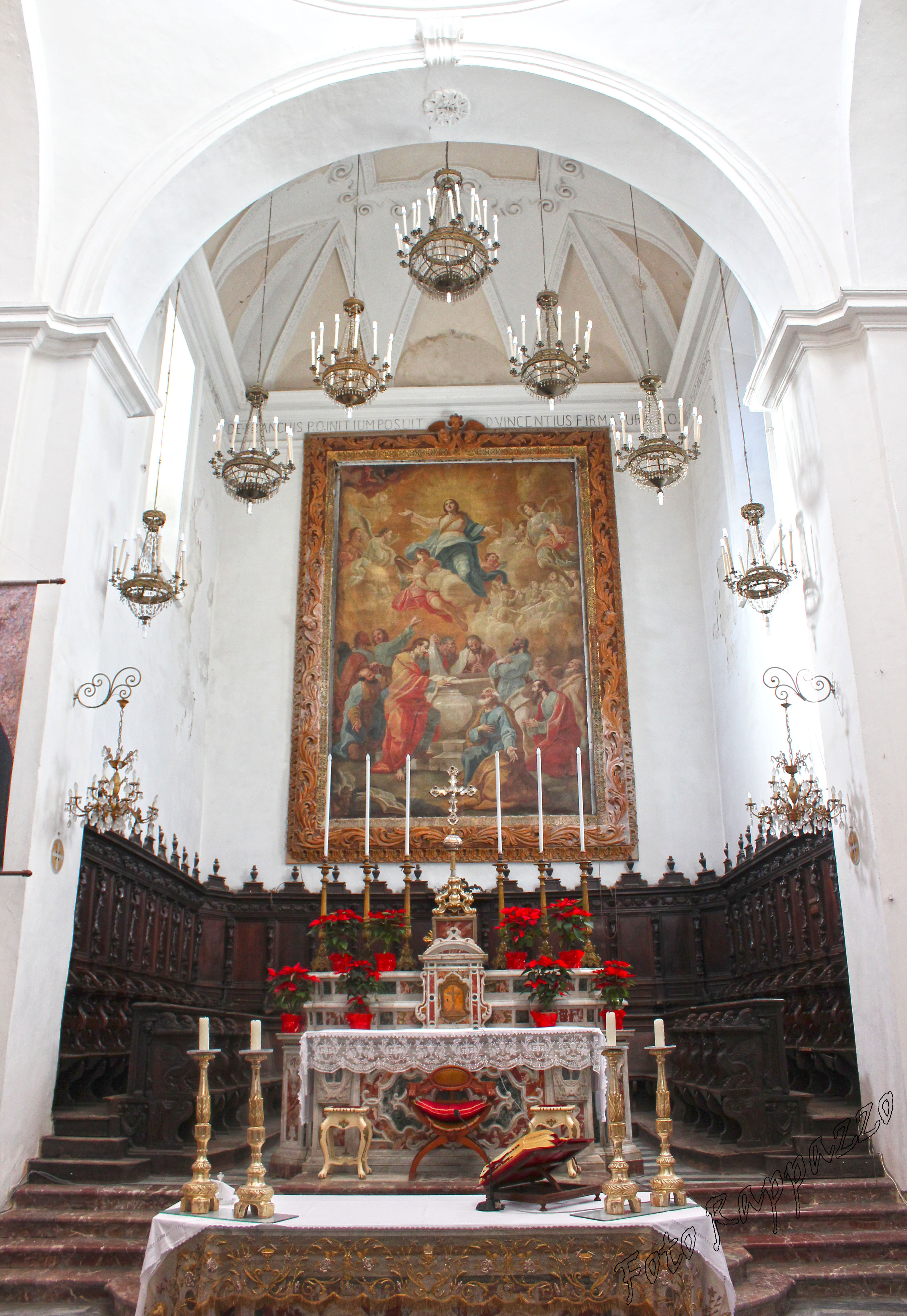 Altare maggiore, Dipinto Fra Felice 1771 Assunzione, Santa Lucia del Mela